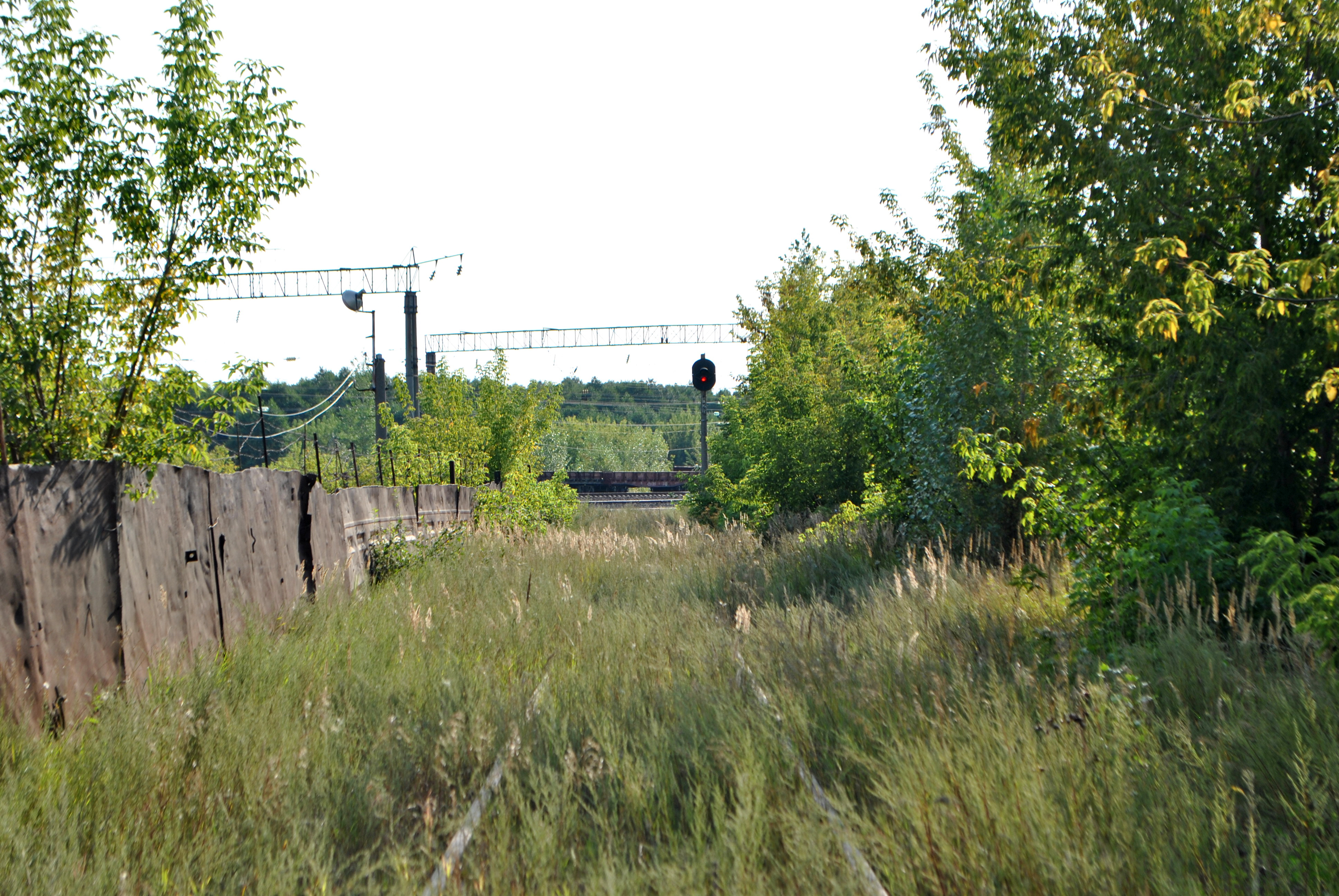 Подъездной путь к Камбарскому заводу газового оборудования